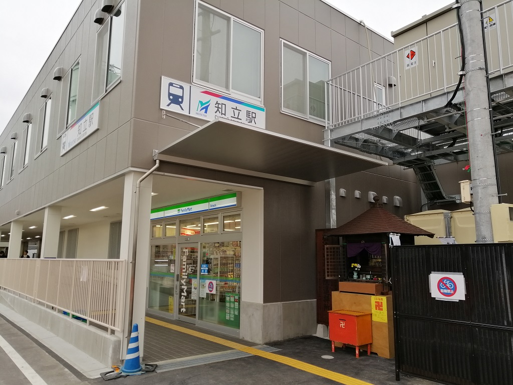 Temporary Chiryu north station building (2019/12)